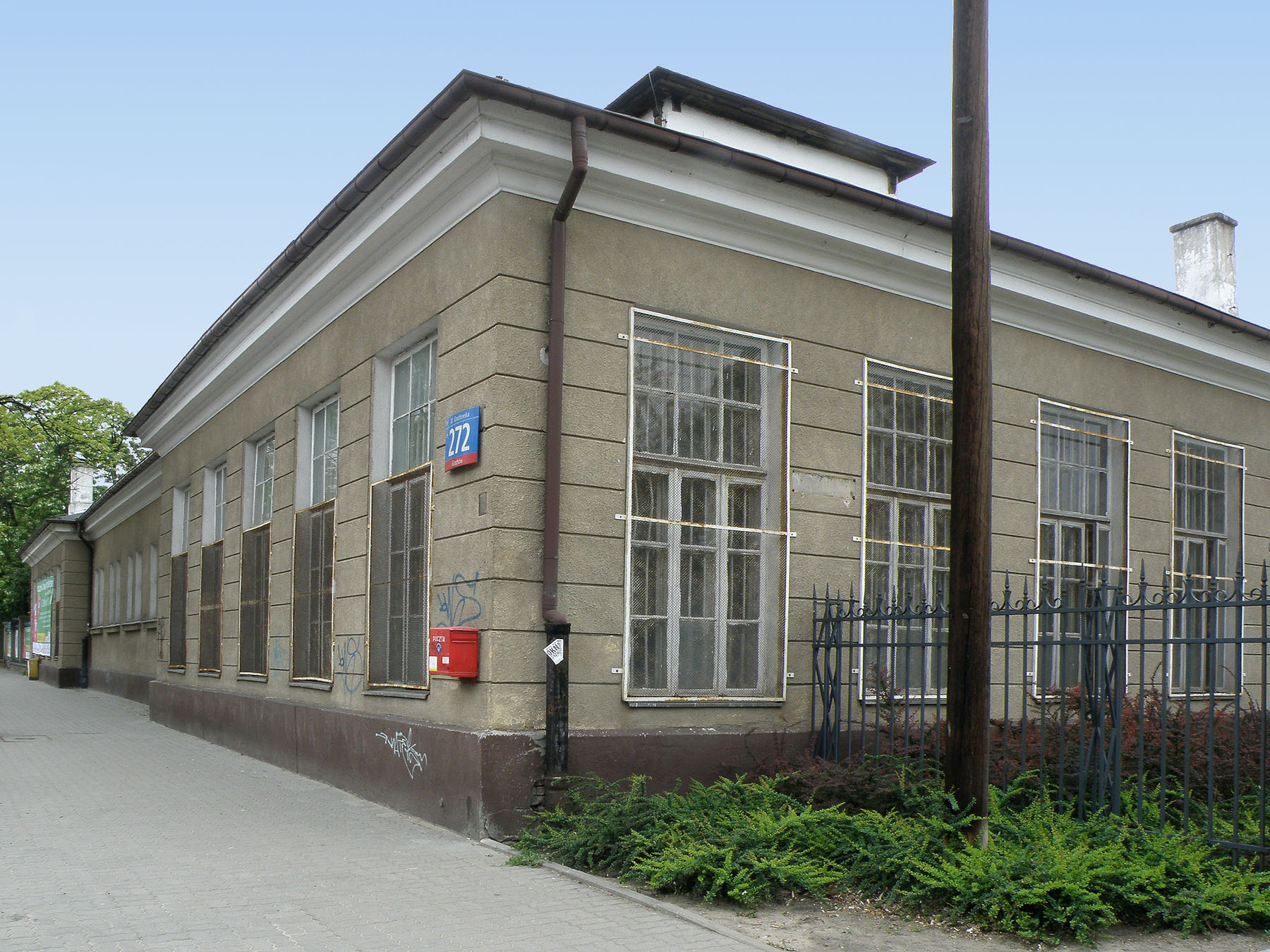 Warszawa, ul. Grochowska 272, Wydział Weterynaryjny SGGW)